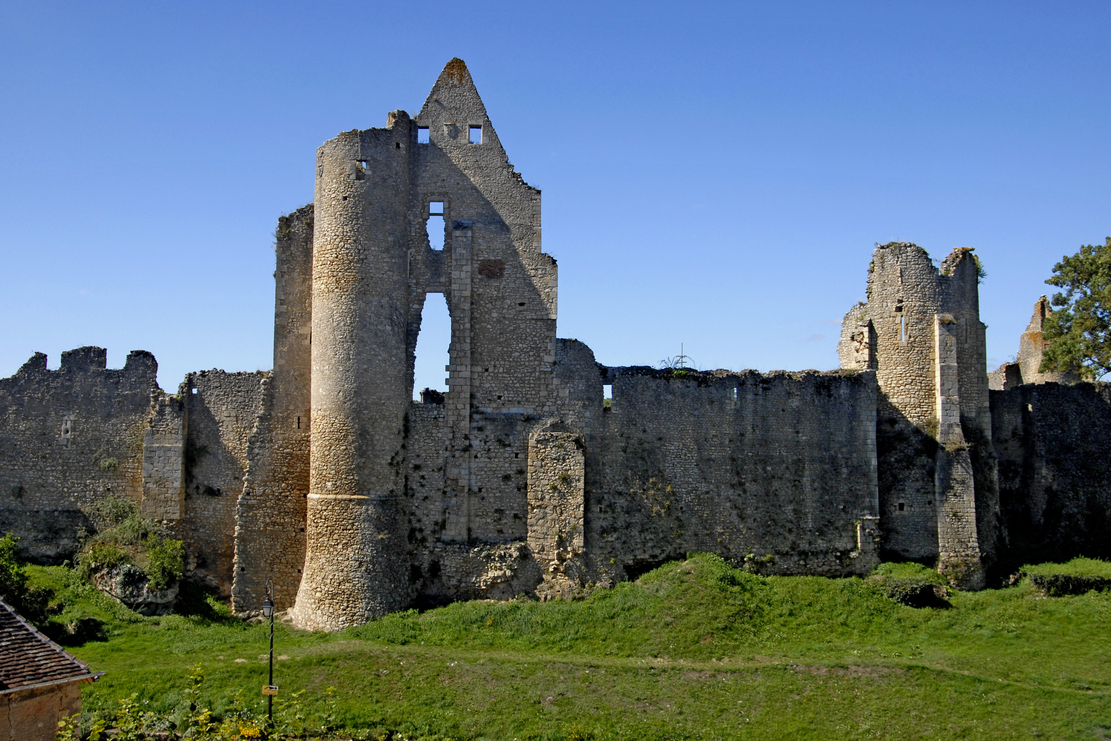 Angles-sur-l'Anglin, Burgruine Dorfseite